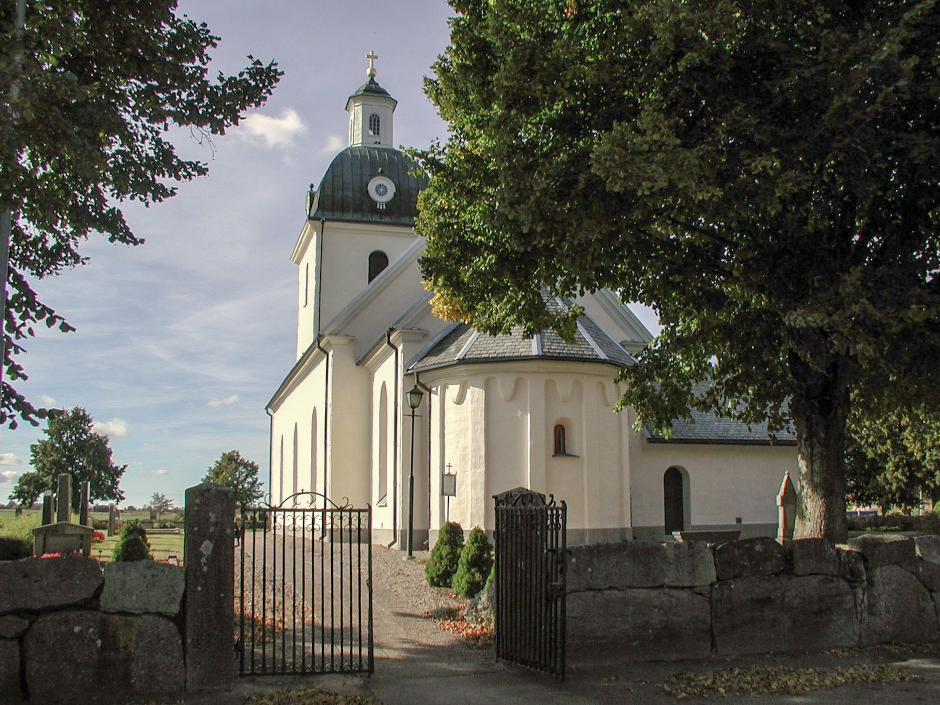 Hogstad kyrka